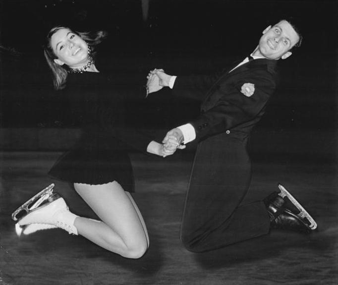 György Herda, Paul Wasarhelyi Zentralbild Studré 12.11.1964 Internationale Eiskunstlauf-Wettbewerbe Nach dem Pflichttanzen im Eistanz liegt das ungarische Paar György Herda-Paul Wasarhelyi vor dem DDR-Paar Annerose Baier-Eberhard Rüger. Vom 12.-14.Novermber 1964 finden in der Berliner Werner-Seelenbinder-Halle Internationale Eiskunatlauf-Wettbewerbe um die Pokale des Deutschen Eislauf-Verbandes für Damen, Herren, Paare und Eistanzen statt.